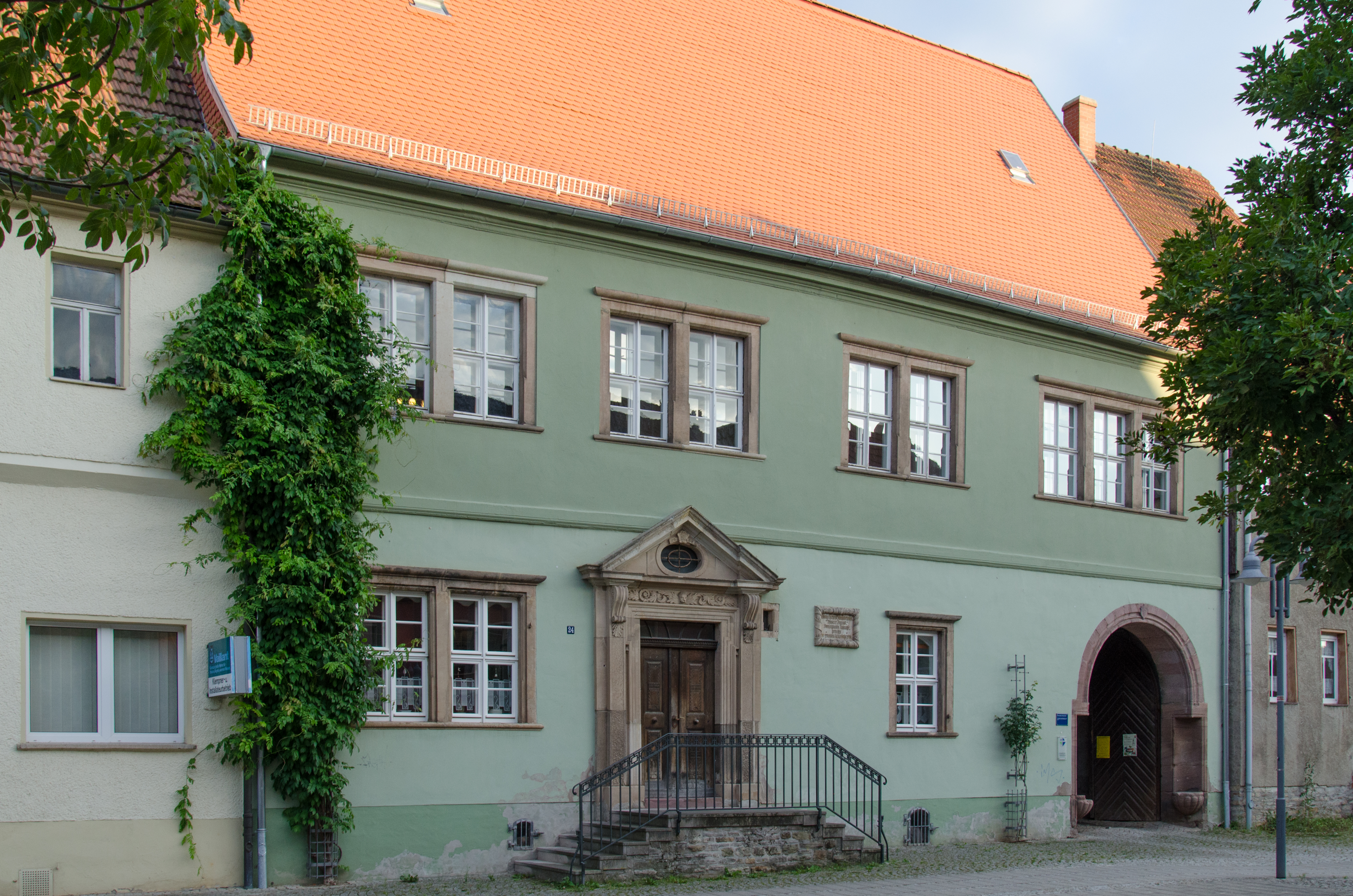 Sangerhausen, Riestedter Straße 24